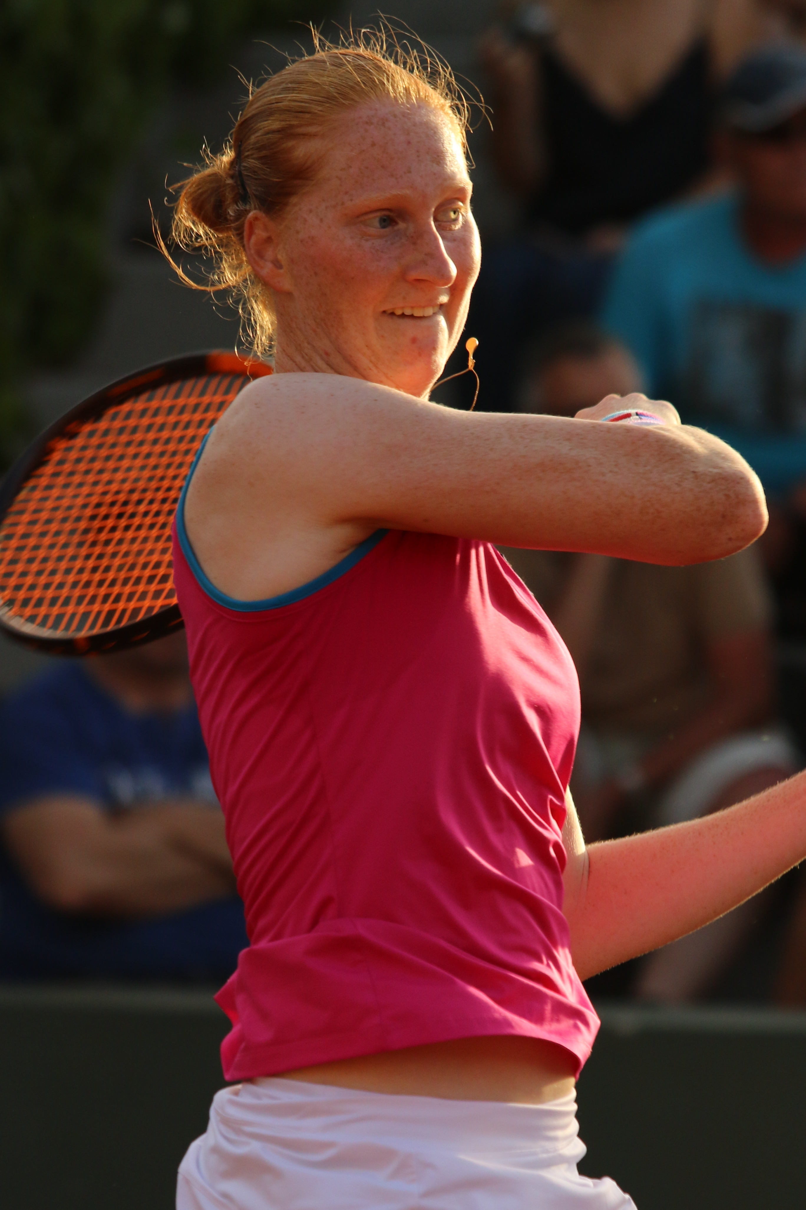 van Uytvanck RG18 (6)